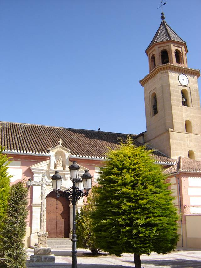 Iglesia parroquial de El Padul (Granada, España)